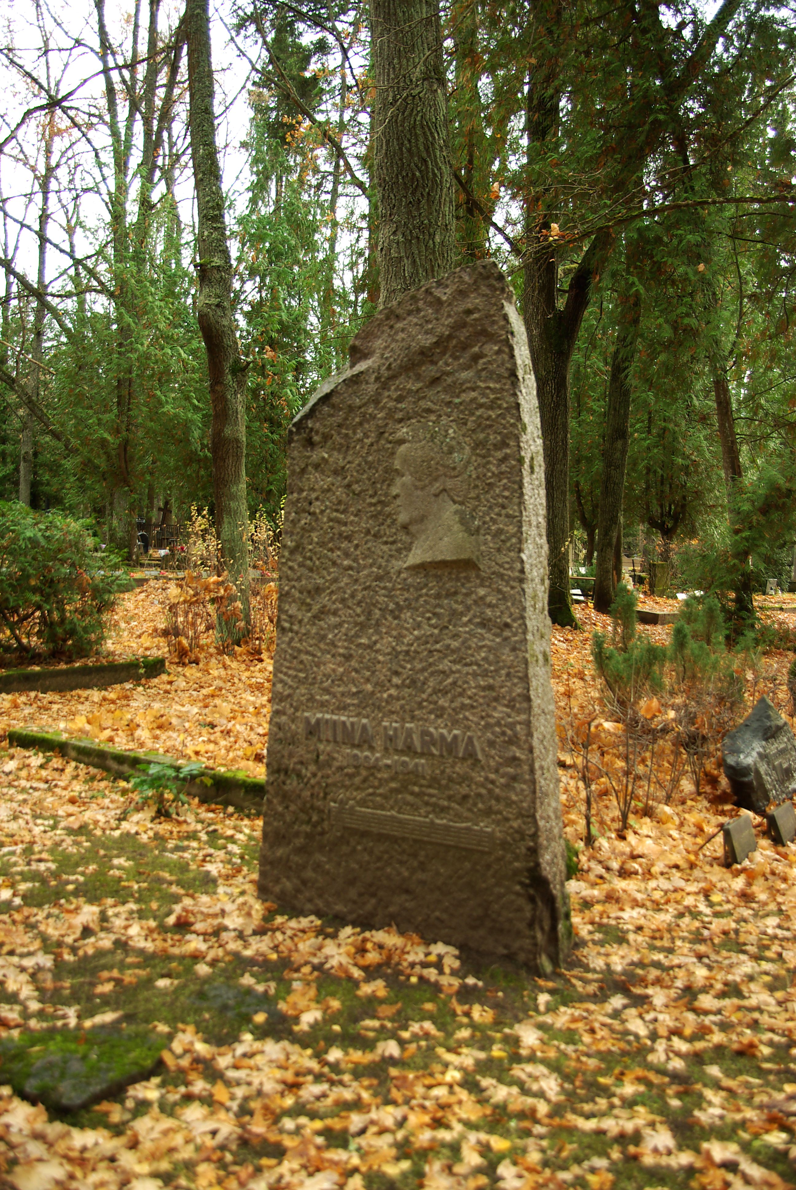 Tartu,Maarja kalmistul.Maarja kalmistu paikneb Raadi kalmistu kesk- ja põhjaküljel.